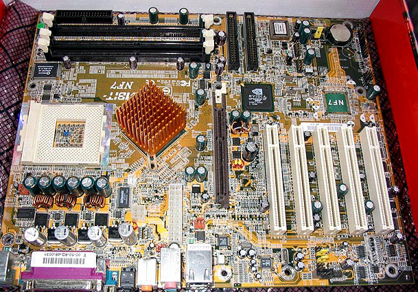 Abit NF7 Rev. 1.0 / nForce2 chipsatz / Mainboard / Northbridgekühler ist nicht der originale